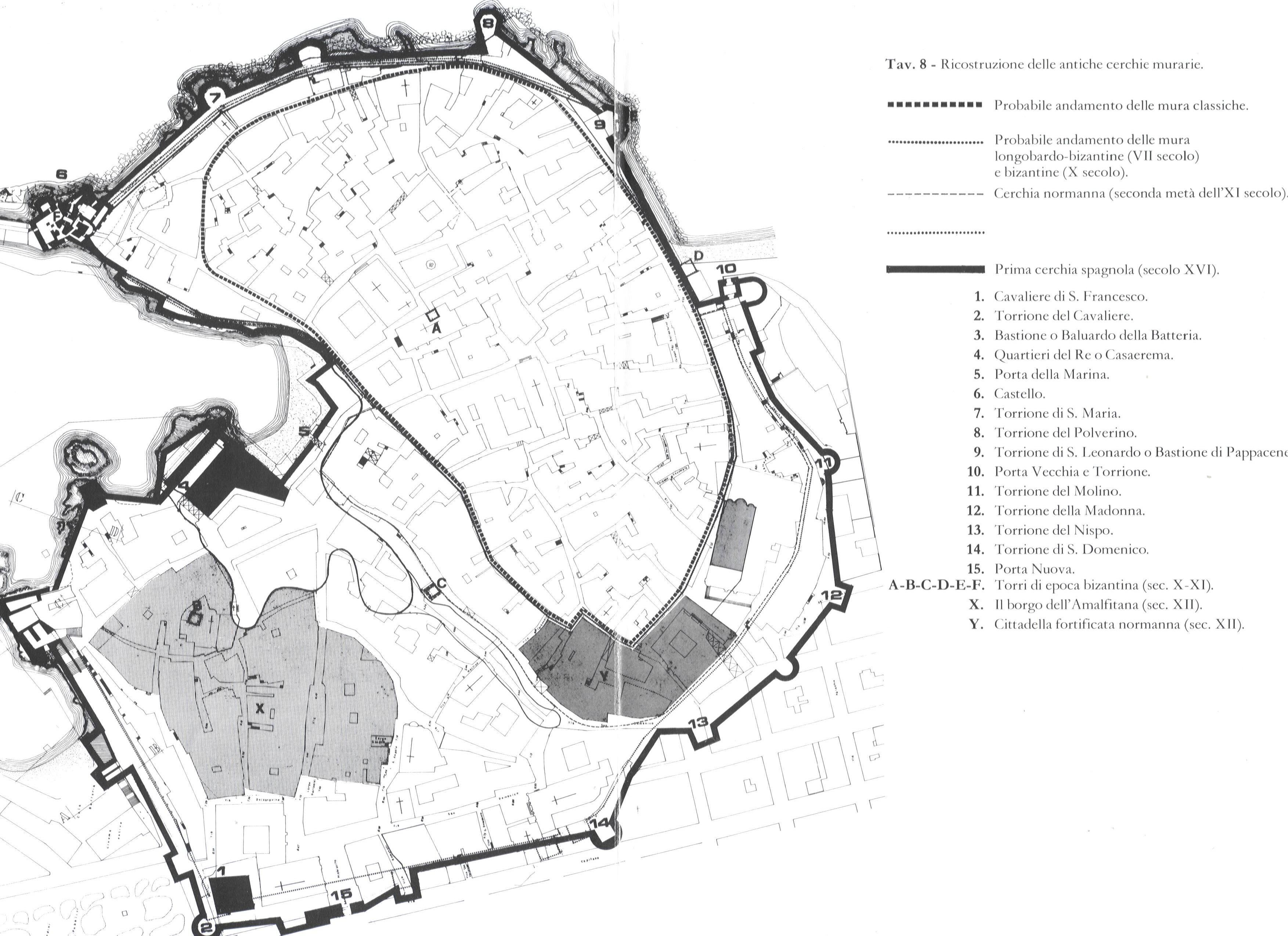 ricostruzione del sistema di fortificazioni monopolitano dall'età classica al XVIII sec.